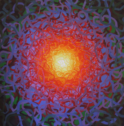 Fotó Tari Eszter (Pécs, 1976. - ) Intro XI. című festményéről. A festmény adatai 2008. olaj, vászon, 200 x 200 cm. A festmény a Pécsi Tudományegyetem Művészeti Kar Doktori Iskola tulajdona. A festmény a Színerő – Léptékváltás III. című kurzuson készült. A fotó Tari Eszter 2009-es kiállításán készült a Pécsi Kis Galériában.